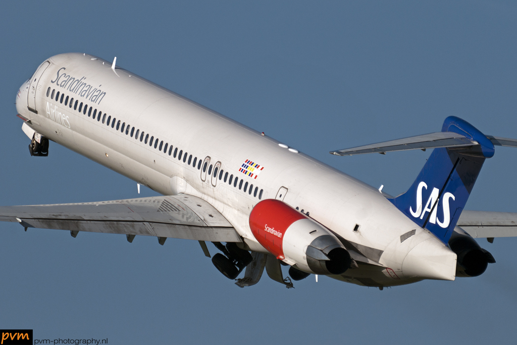 McDonnell Douglas MD-82 (DC-9-82) Amsterdam schiphol [AMS / EHAM] 22-05-2010